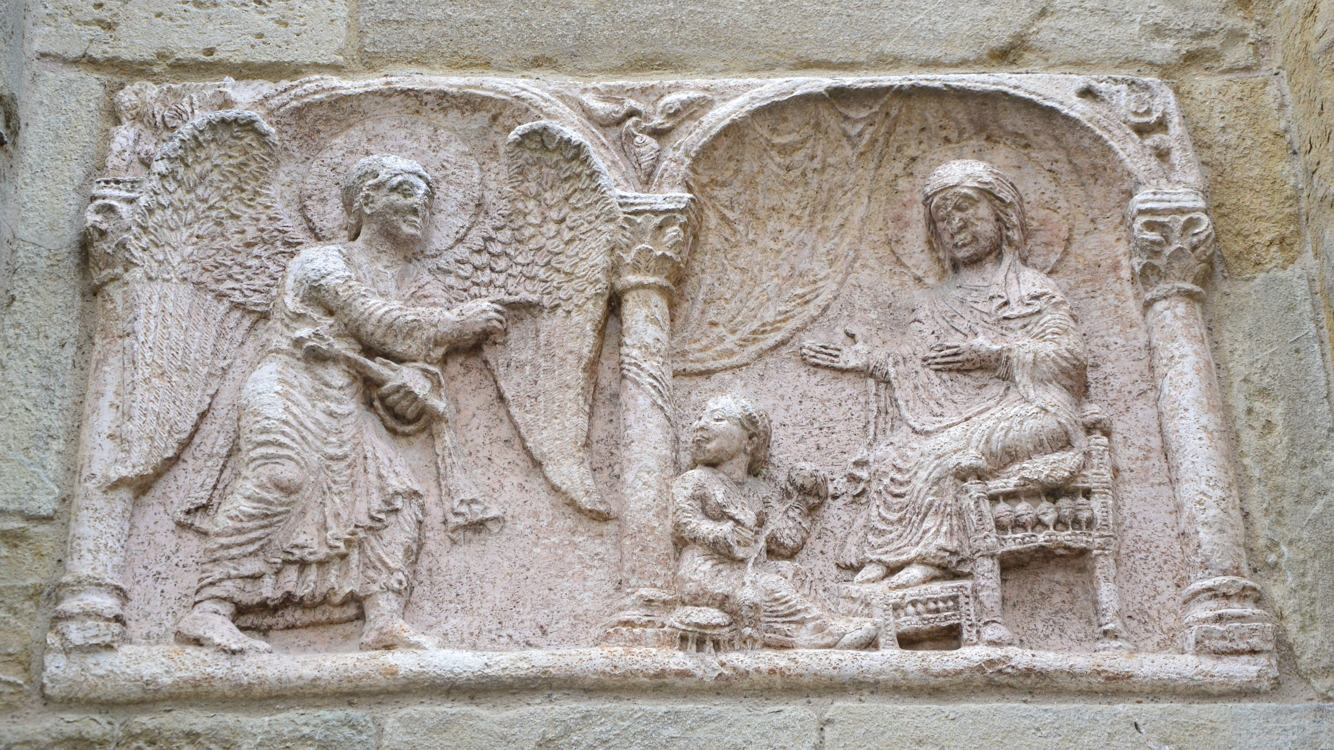 San Michele Maggiore (Pavia)